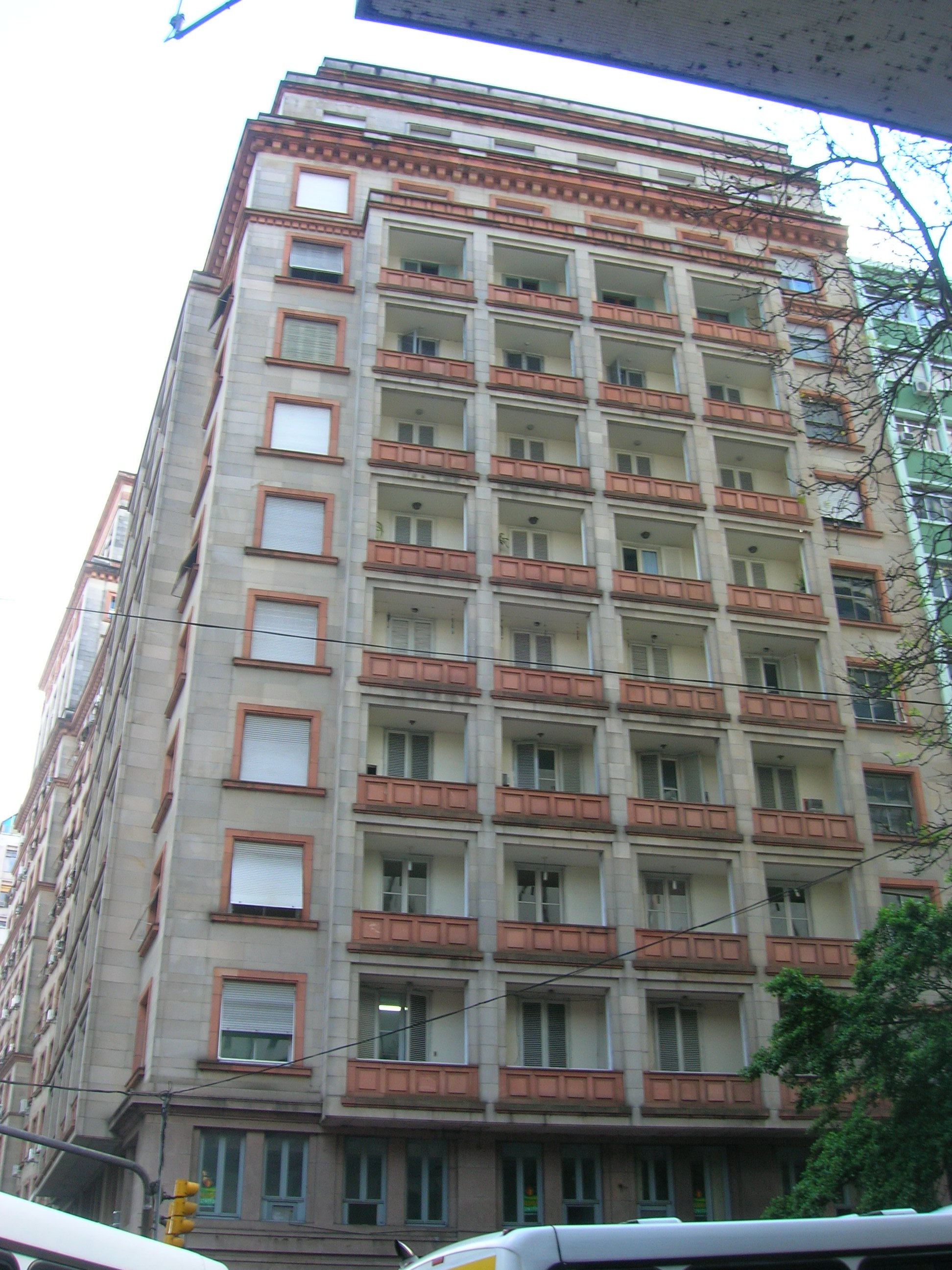 O Edifício Sulacap, projetado pelo arquiteto Arnaldo Gladosch, na Avenida Borges de Medeiros, no Centro Histórico de Porto Alegre.